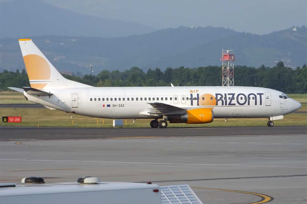 Air Horizont, 9H-ZAZ, Boeing 737-436